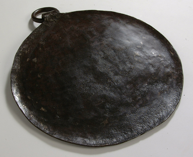 Tuile à galettes du XIXe siècle. L'anneau permet de suspendre la plaque quand elle ne sert pas. institution: Brittany Museum Native nameMusée de BretagneLocationRennes, FranceCoordinates48° 06′ 18″ N, 1° 40′ 30″ W Established1960Web pagemusee-bretagne.frAuthority control : Q3329701 VIAF: 129721020 ISNI: 0000 0001 2156 388X LCCN: n81028936 OSM: 7422696 Museofile: M0212 WorldCat institution QS:P195,Q3329701